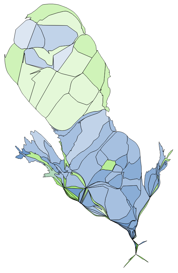 中文（台灣）: 顏色對照表